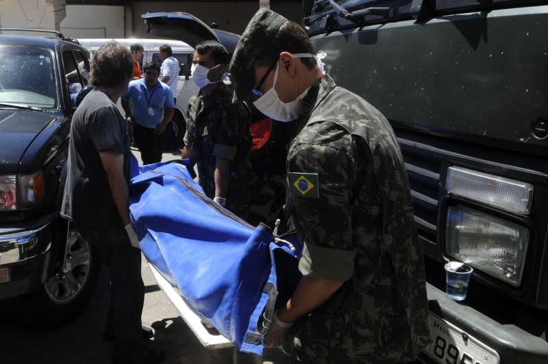 Corpos das vítimas do incêndio na Boate Kiss são levados para o Centro Desportivo Municipal de Santa Maria.